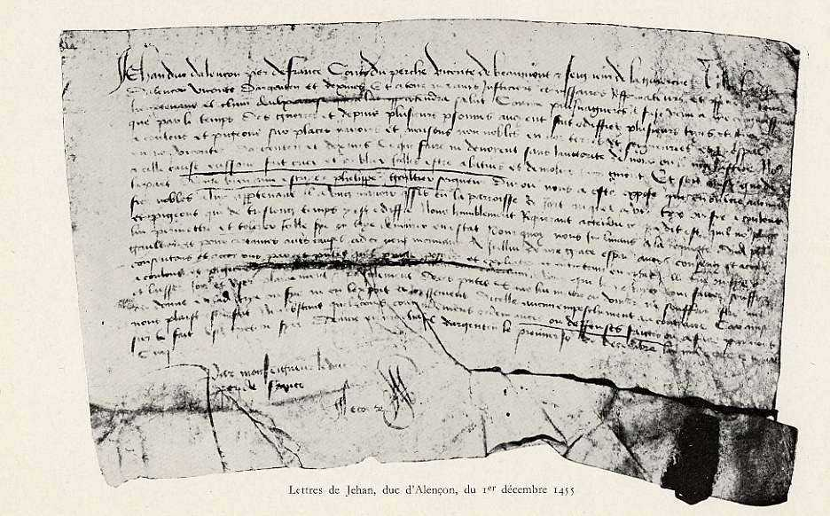 lettre de confirmation de noblesse de Jean, Duc d’Alençon, le 1er décembre 1455